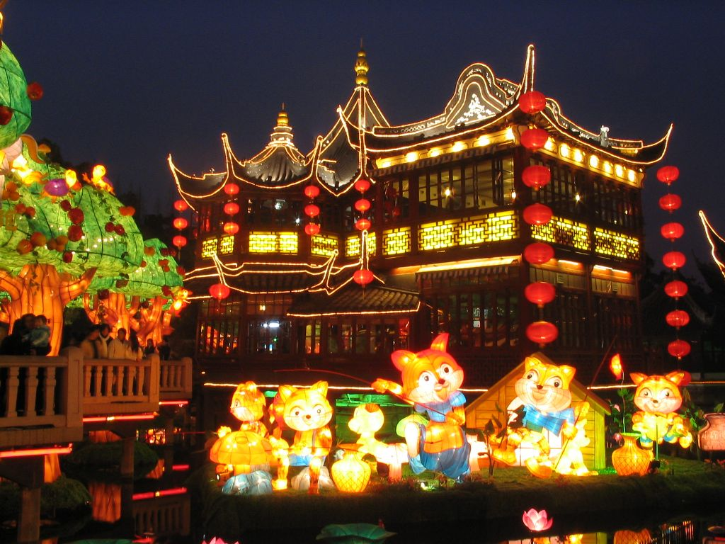 城隍廟/豫園-九曲橋 Yuyuan Garden